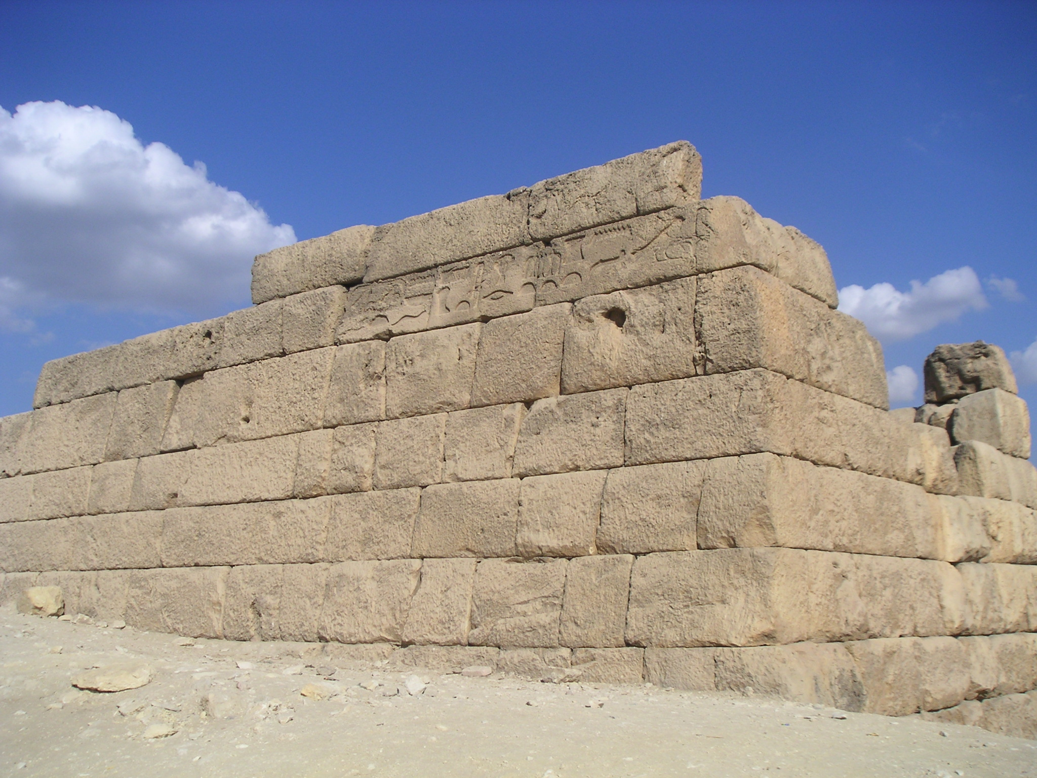 Vue du mastaba de Khoufoukhaf, fils et prêtre de Khéops - Gizeh - novembre 2004